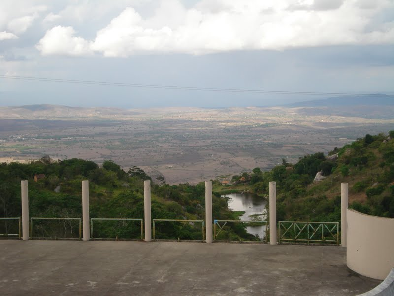 Fotografia do alto da Serra Negra, brejo de altitude localizado no municipio de Bezerros - PE - Brazil